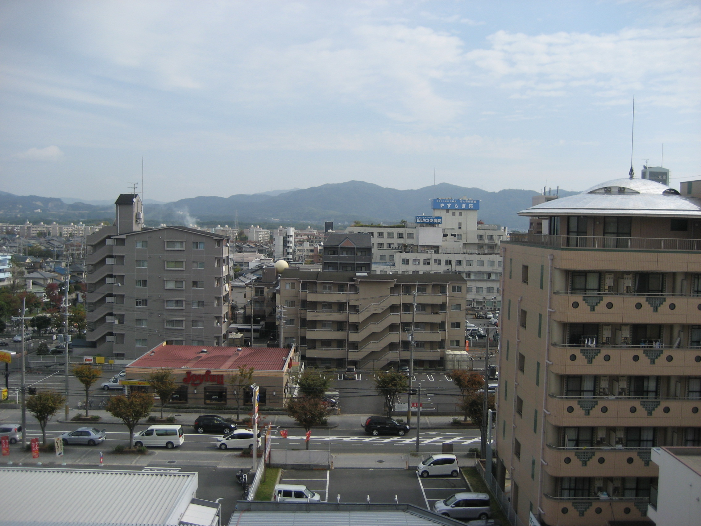 AL-PLAZA View E.